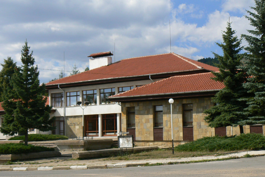 Culture house "Elin Pelin" in the village of Baylovo, Bulgaria. Културен дом "Елин Пелин" в с. Байлово, България